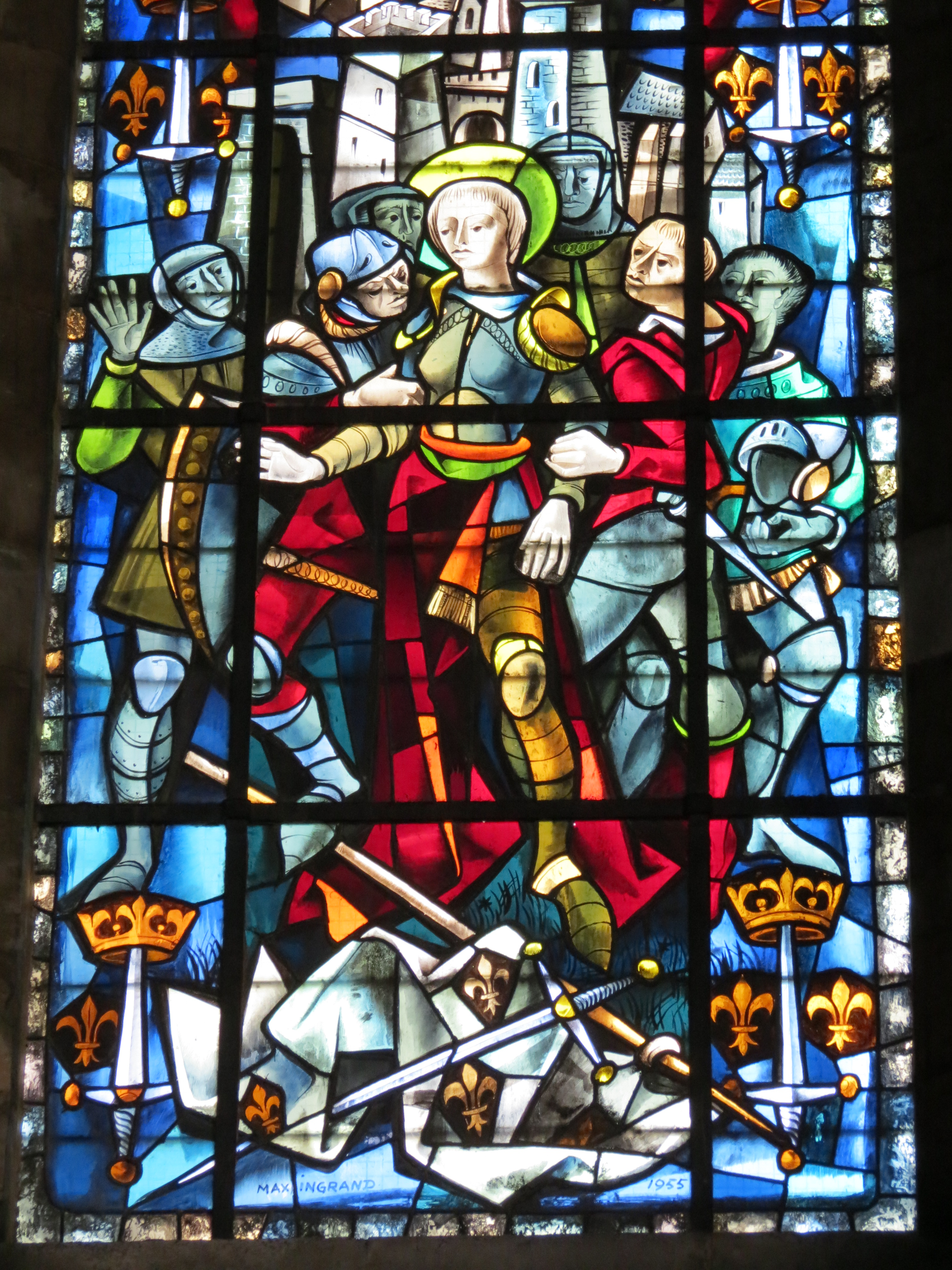 Baie 22 - chapelle Sainte-Jeanne-d'Arc, cathédrale de Rouen